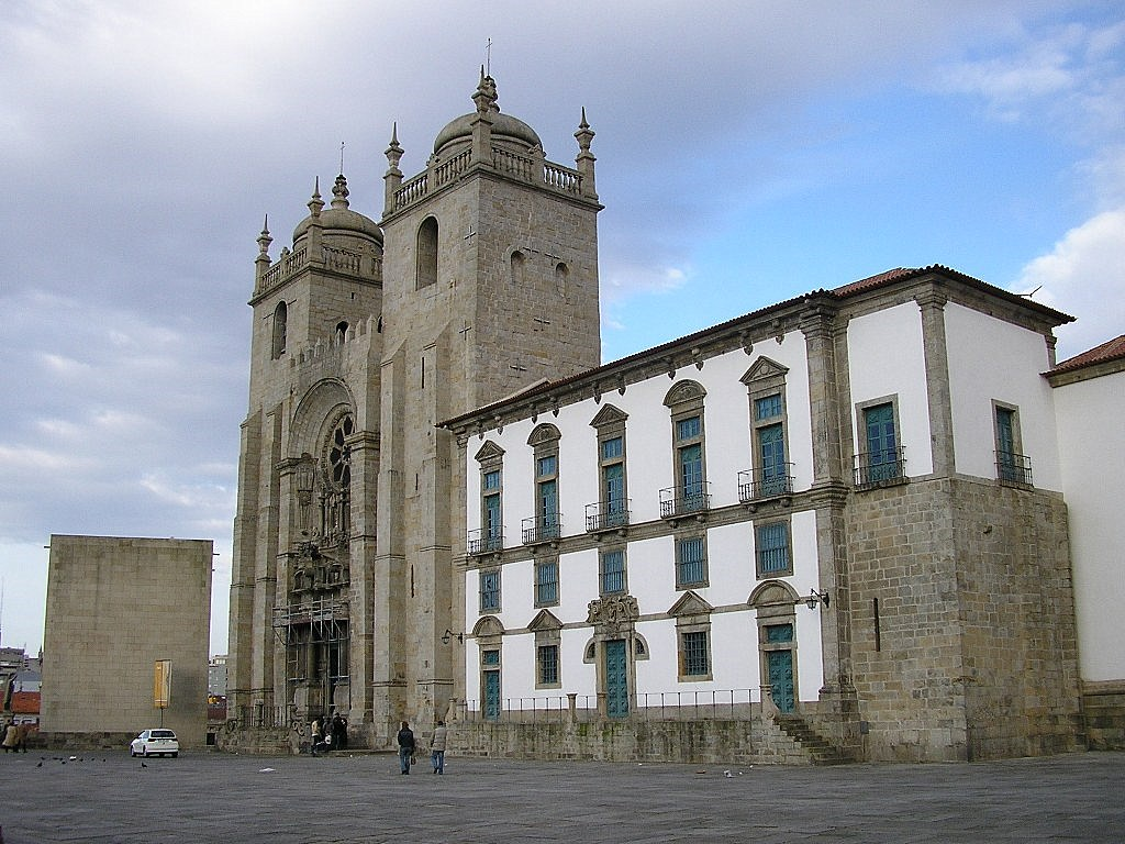 "Terreiro da Sé" in Porto, Portugal.